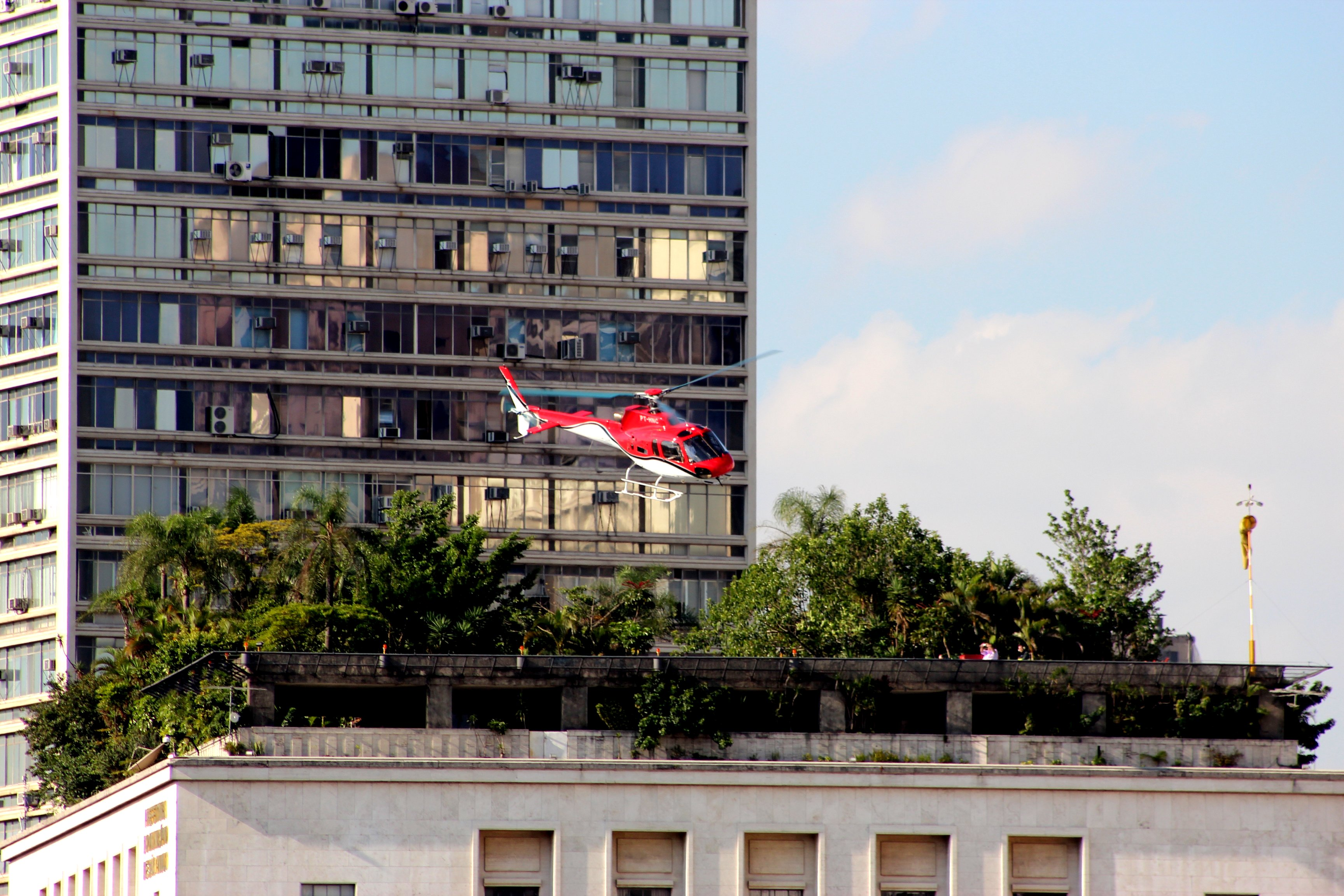 Helicoptero decola do heliponto da prefeitura de São Paulo